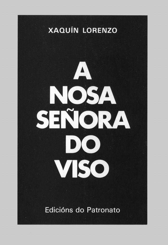 A Nosa Señora do Viso. Edicións do Patronato.